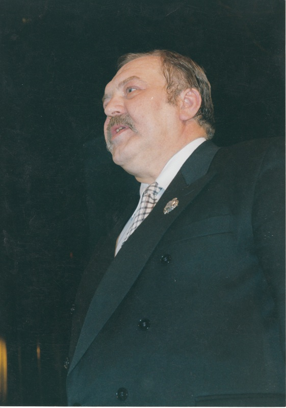 Художественный руководитель Нижнетагильского драматического театра имени Д.Мамина-Сибиряка на своем юбилее